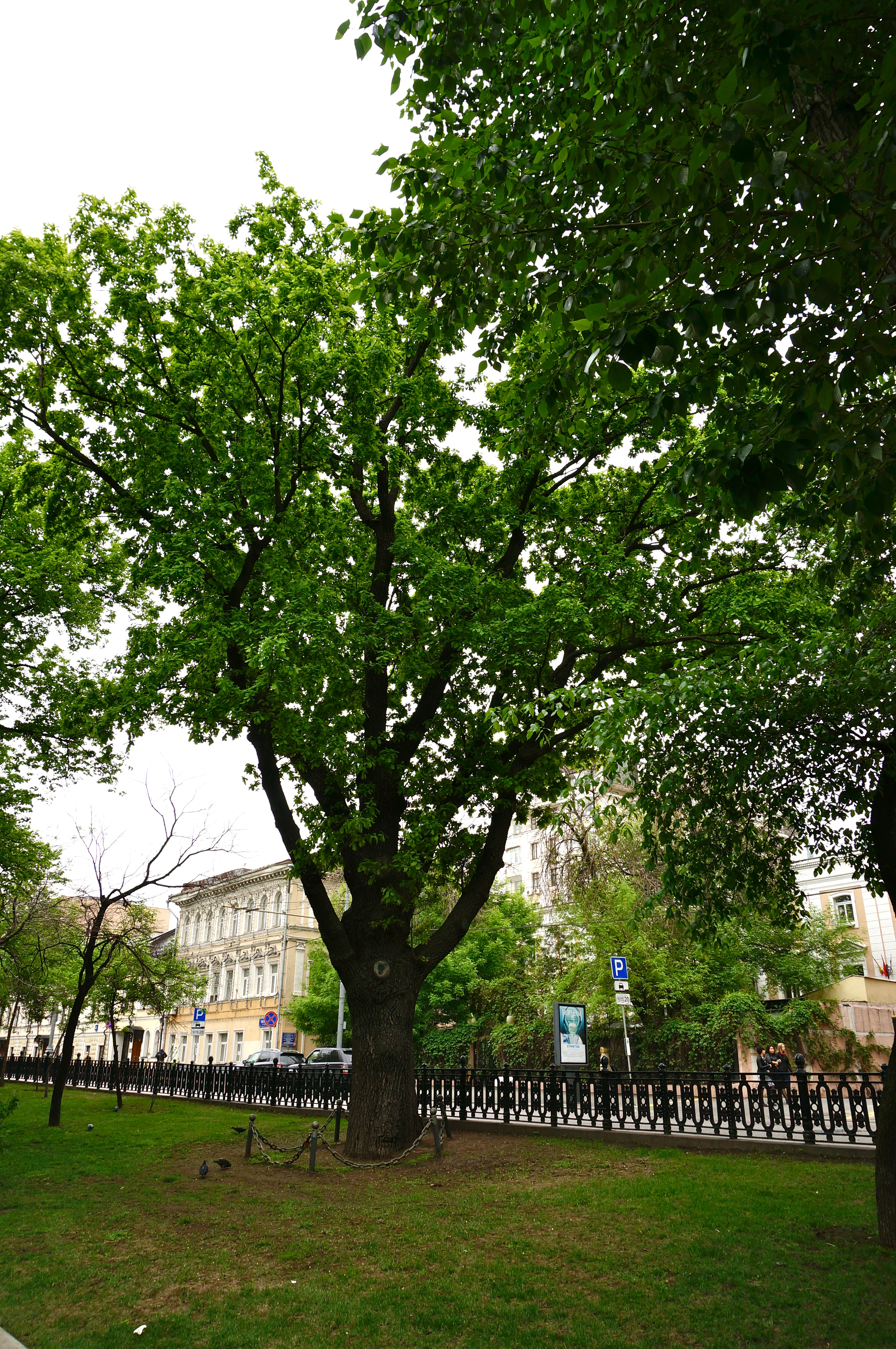 Дуб на Тверском бульваре (Пушкинский дуб), Центральный округ This image is related to the protected area of Russia number 7710117